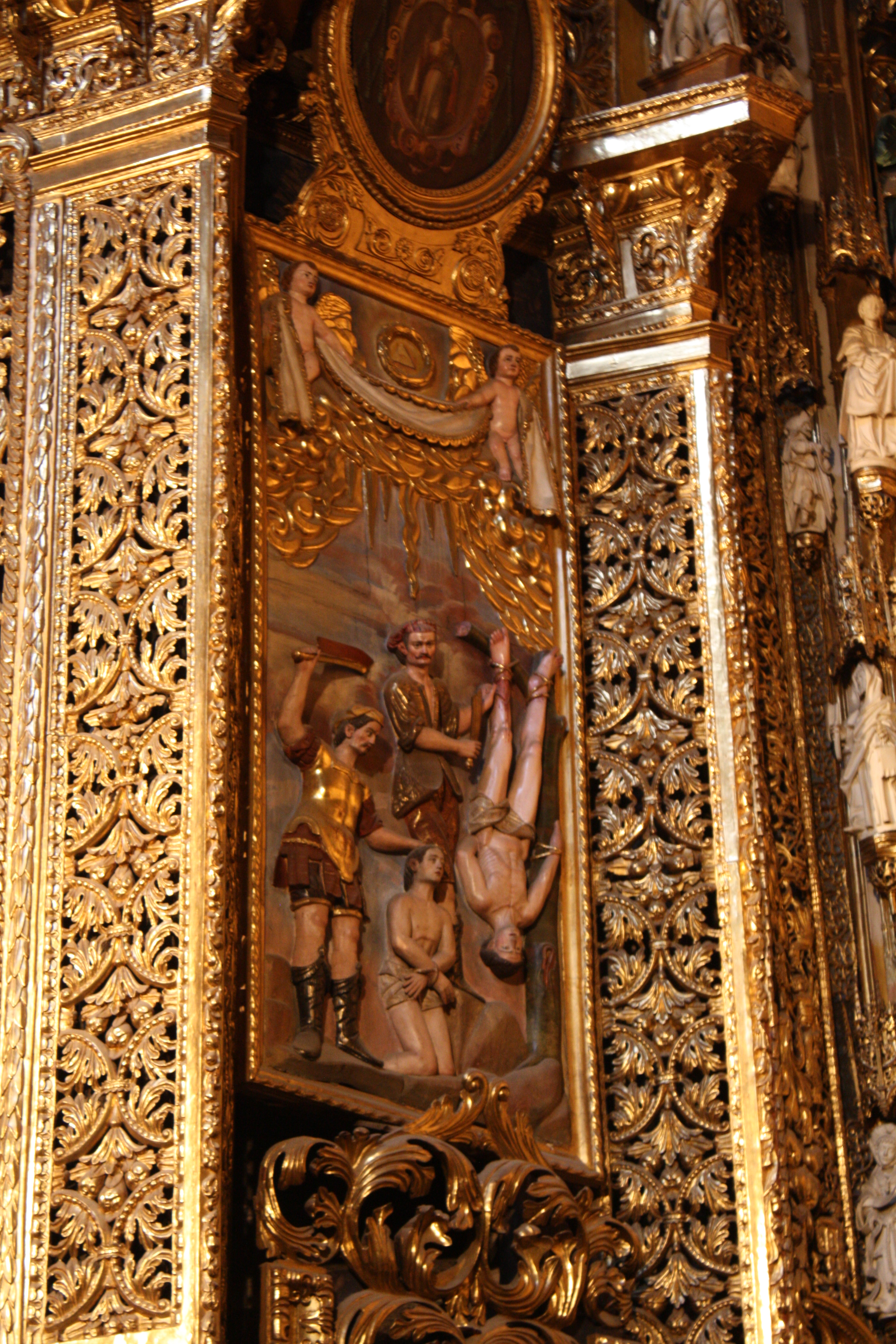 Relevo co martirio dos santos Facundo e Primitivo, na Capela Maior da Catedral de Ourense